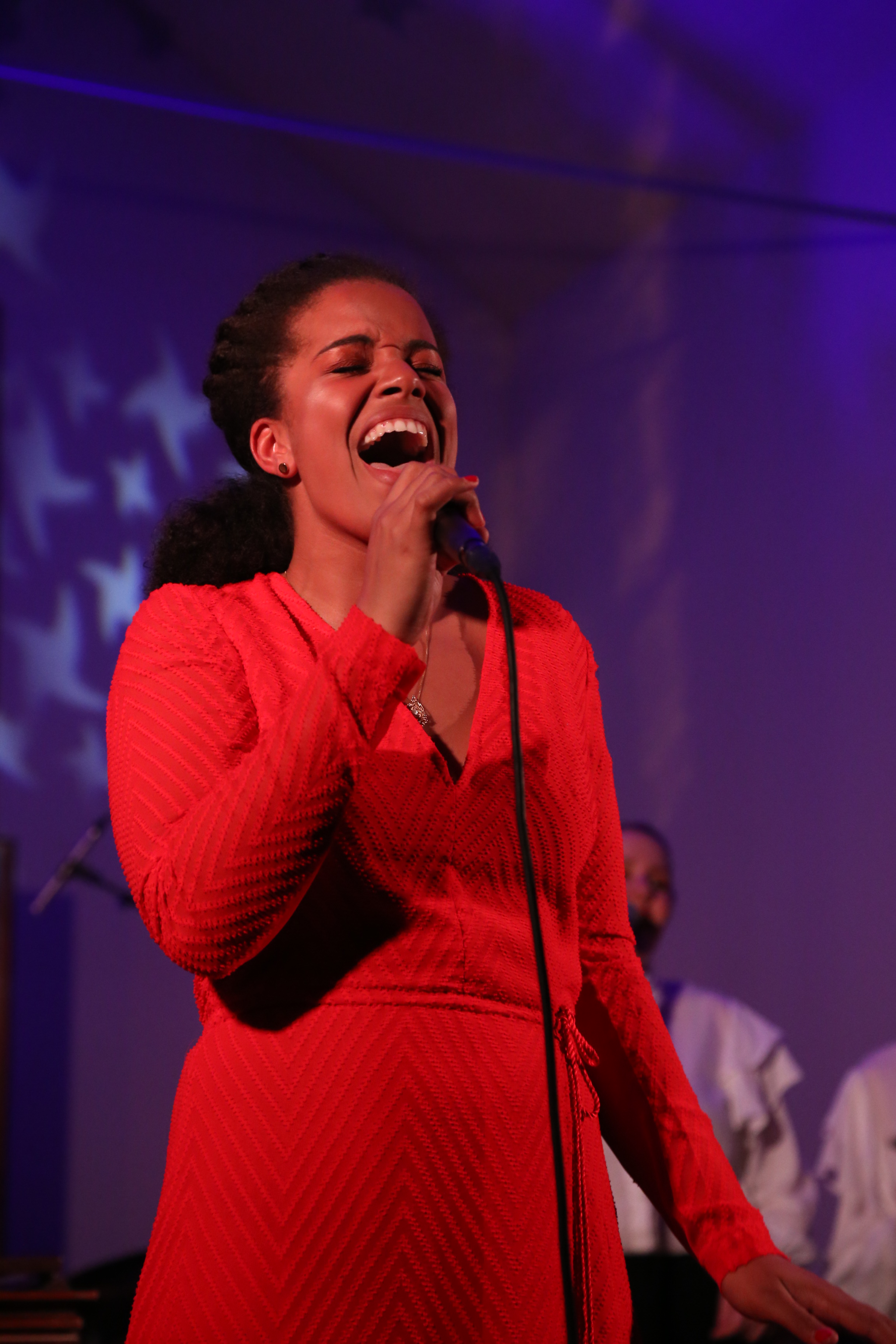 Amanda Kamara, Foldereid Kirke 2016